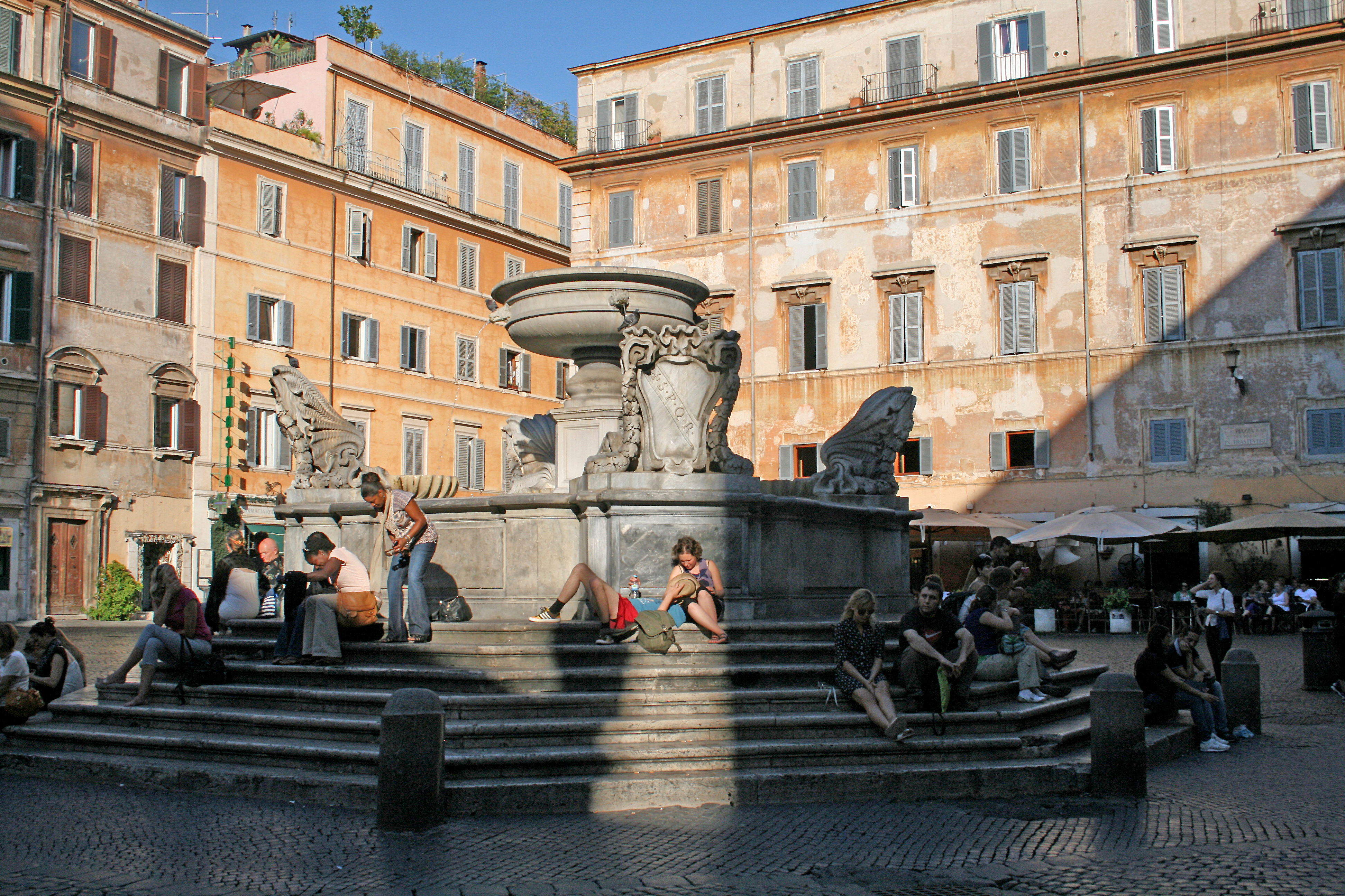 Piazza di Santa Maria in Trastevere - Rome (Italie).